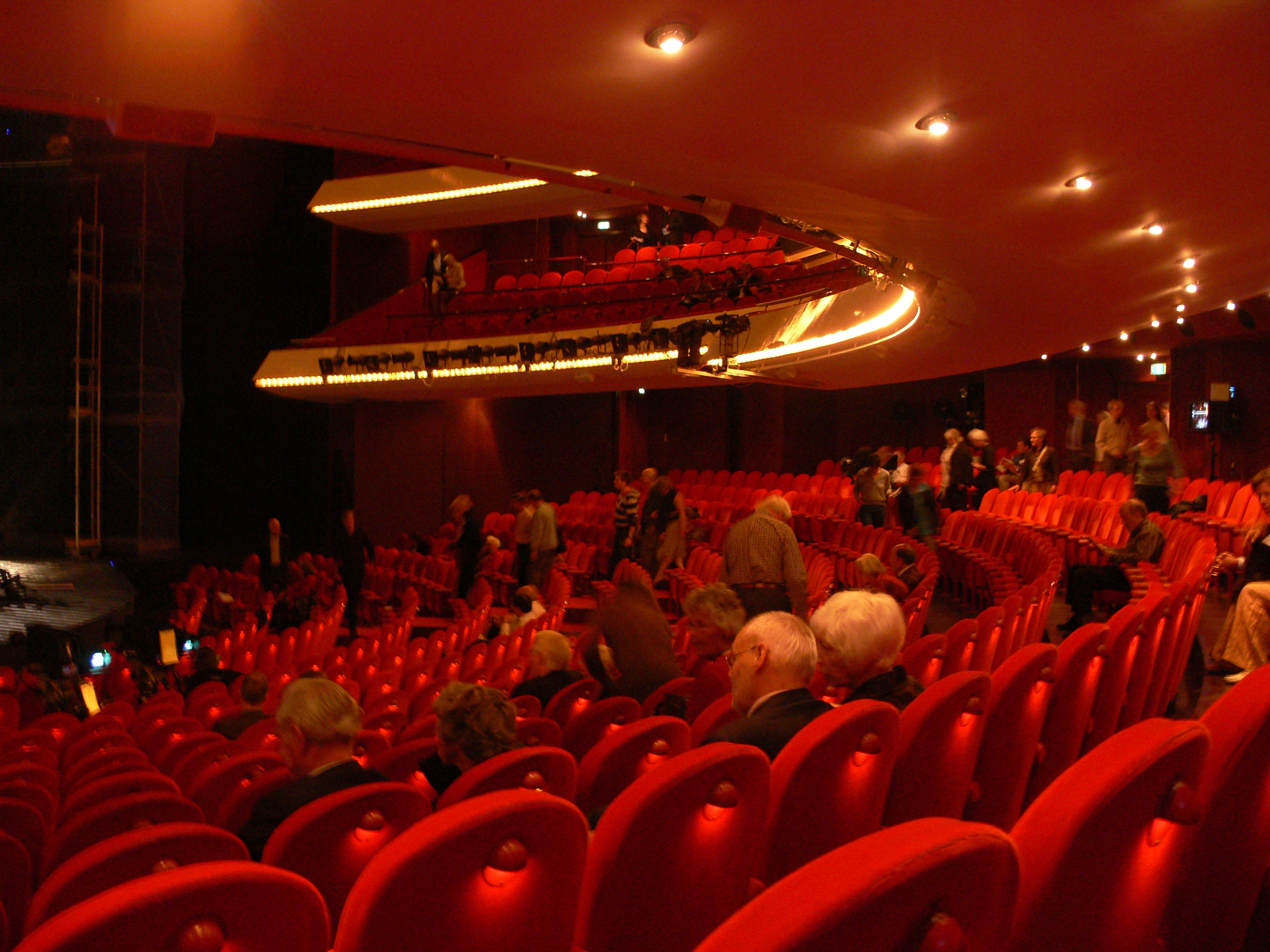 Het Muziektheater, Waterlooplein, Amsterdam